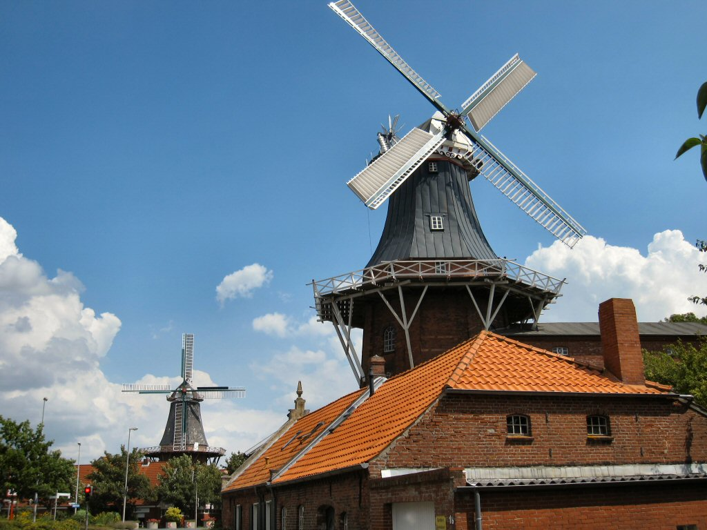 Die Deichmühle in Norden (Ostfriesland). Im Hintergrund ist die Frisia-Mühle zu sehen.